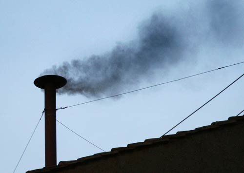 Fumo negro saindo da Capela Sistina.